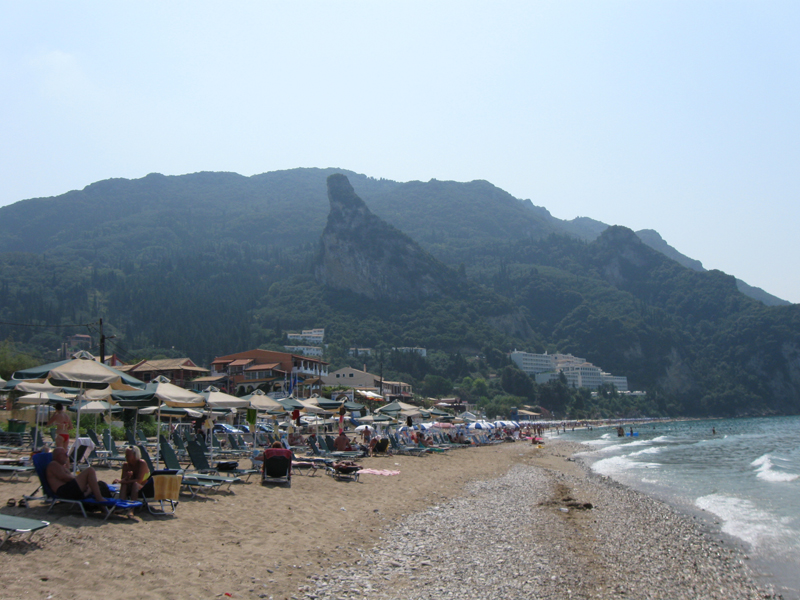 Аутор: Корисник:SmirnofLeary, август 2009. године. Плажа Агиос Гордис, на југозападном делу острва Крф, позната по брду специфичног облика изнад плаже.